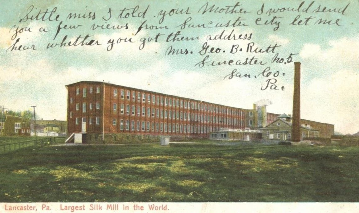 Stehli Seiden AG, Lancaster (Pennsylvania) , Vereinigte Staaten